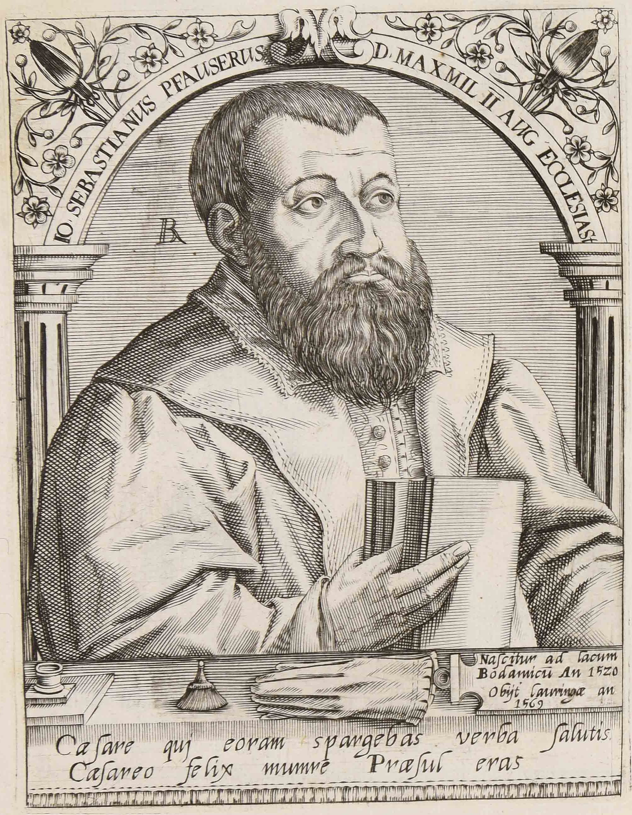 Calcografia in Jean Jacques Boissard, Bibliotheca sive Thesaurus virtutis, Frankfurt am Mein: William Fitzer 1627. Esemplare GI 1 v. c 41 della Biblioteca comunale di Trento, che presenta aggiunte successive.